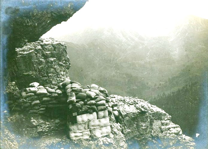 Снимка на австро-унгарска високопланинска позиция край Кол ди Лана в Северна Италия през Първата световна война.